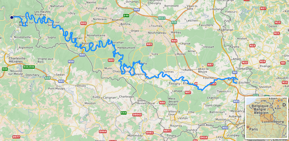 carte réalisée sur umap [1] This map may be incomplete, and may contain errors. Don't rely solely on it for navigation.